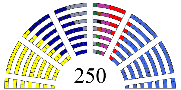 Parlamentarni izbori 2007 - raspodela mandata